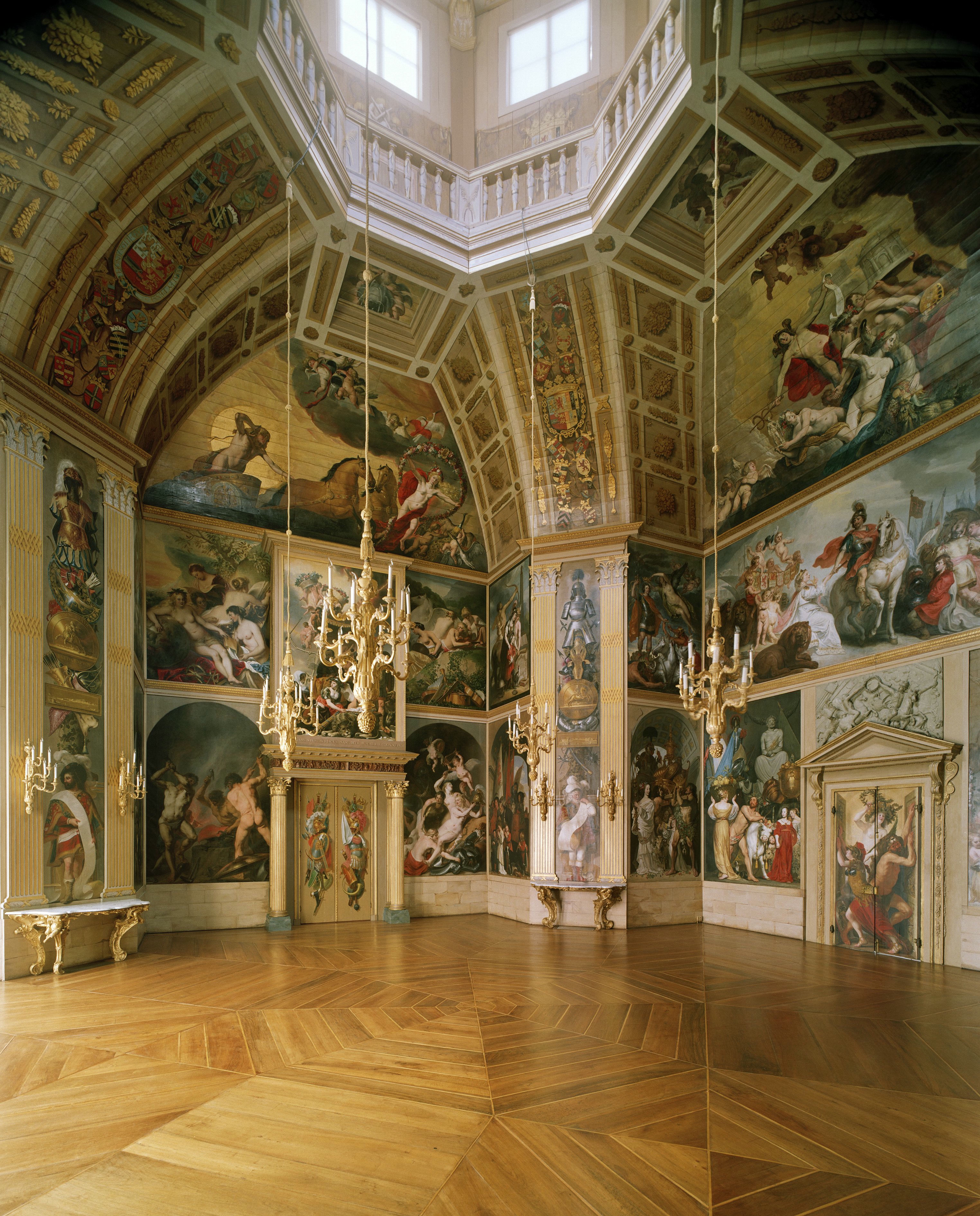 Huis ten Bosch: Oranjezaal na de restauratie: overzicht west- en noordwand